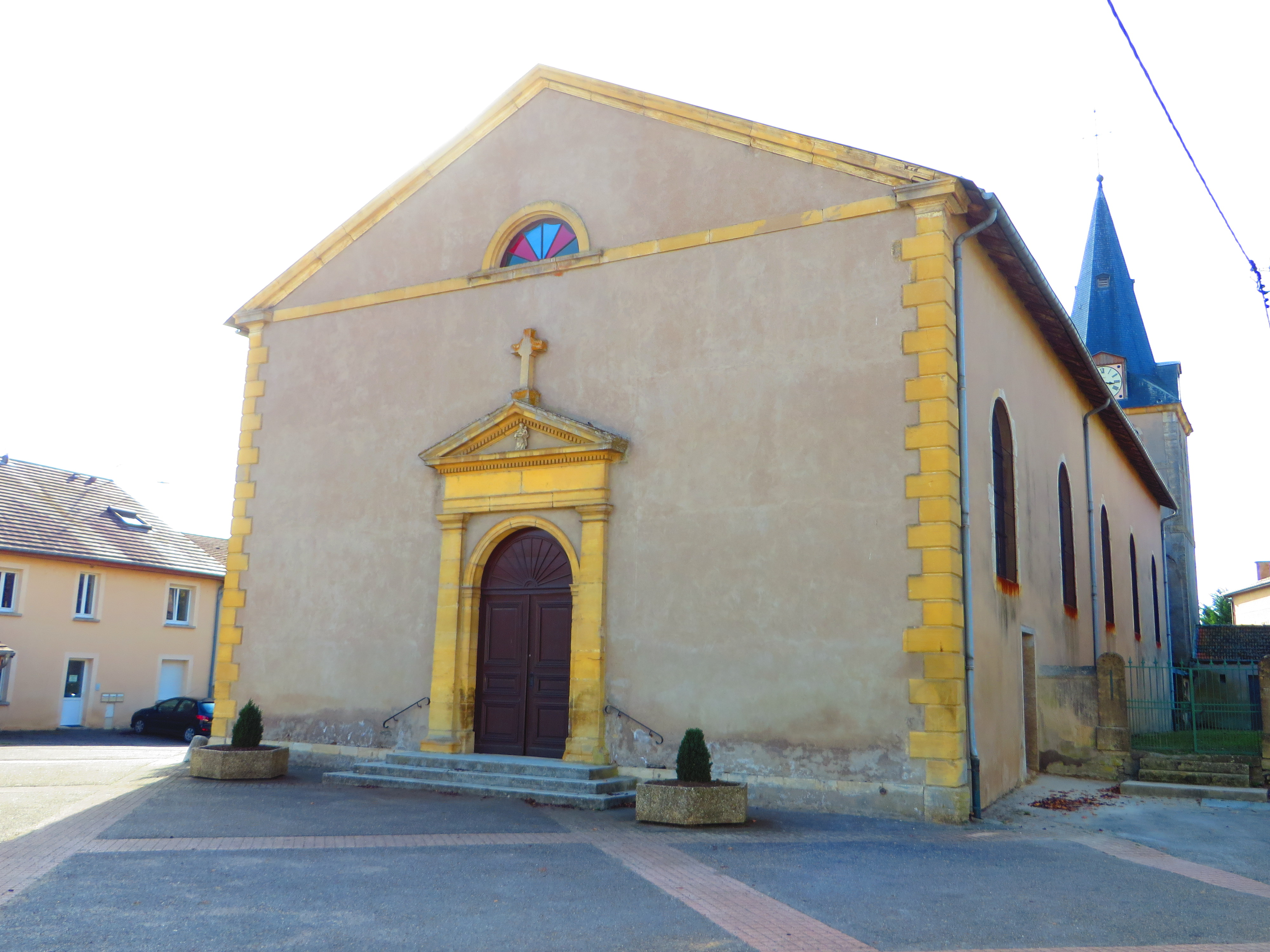 Luppy Église Saint-Jacques